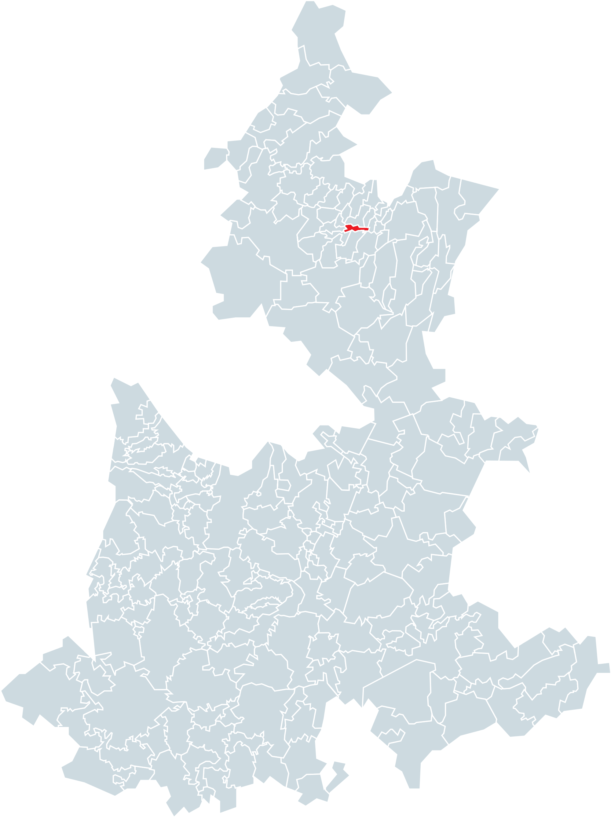 Municipio de Zapotitlán de Méndez